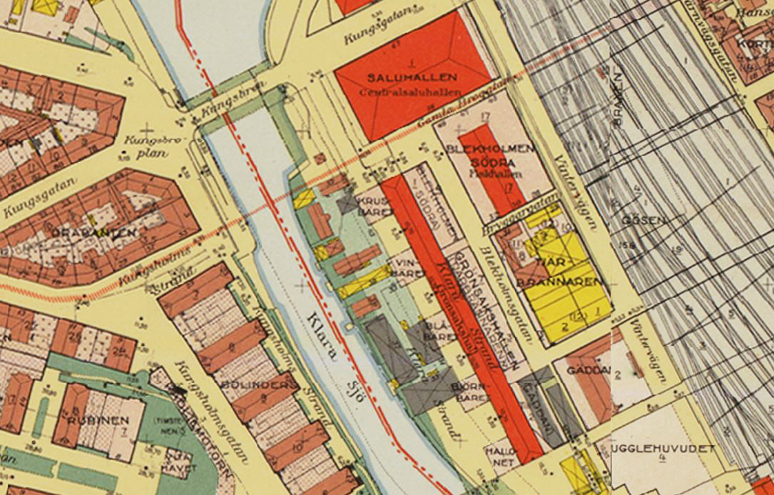 Del av karta över Stockholm visande Centralsaluhallen och Klarahallen